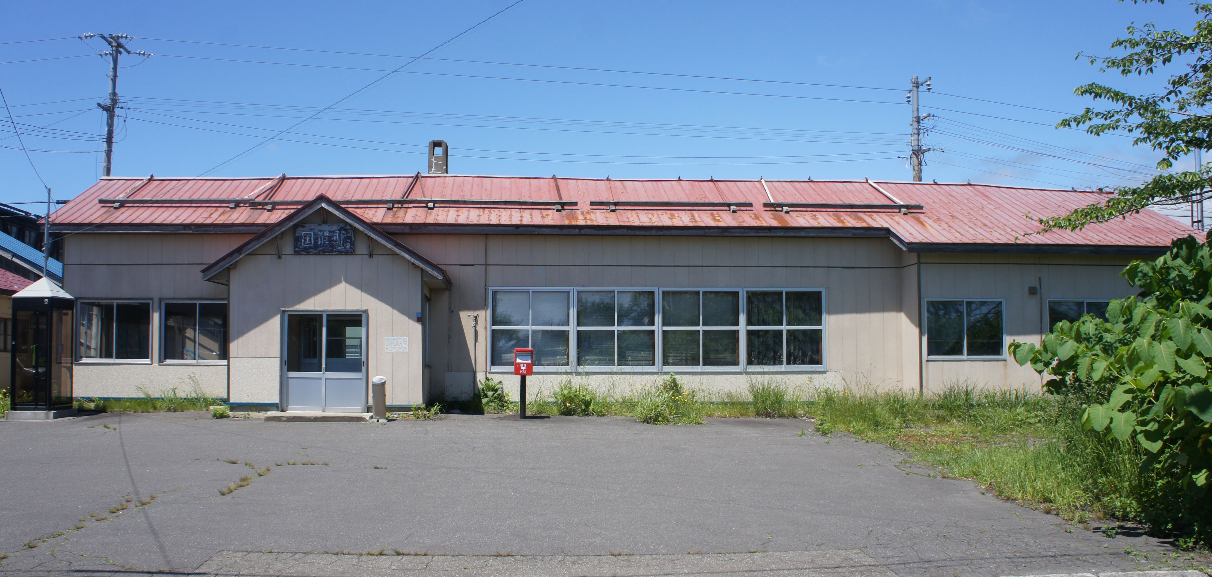 JR函館本線・国縫駅の駅舎